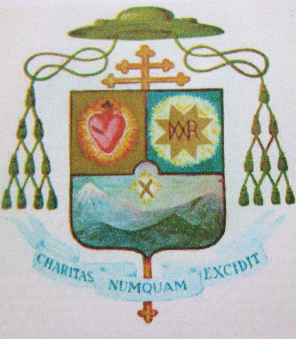 Escudo episcopal de monseñor Martín Tritschler y Córdova